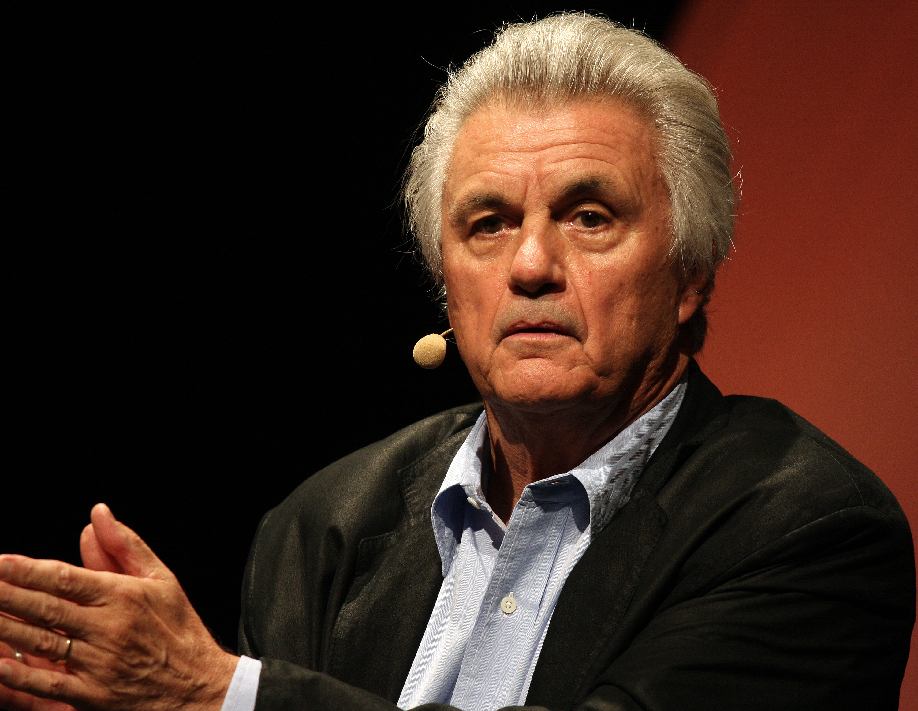 John Irving bei einer Lesung in Köln